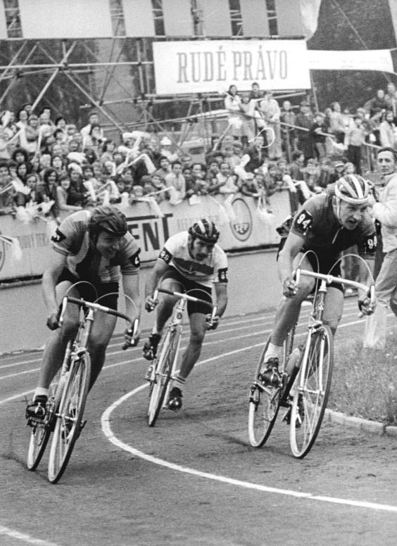 Friedensfahrt, Ústí nad Labem, Endspurt ADN-ZB Reiche -19.5.77-str Usti nad Labem: 30.Internationale Friedensfahrt 11.Etappe Mlada Boleslaw nach Usti nad Labem über 147 km. Zielspurt in Usti nad Labem. Nach dem die drei Fahrer über 100 km gemeinsam dem Hauptfeld mit über zwei Minuten Vosprung vorausgefahren waren, sind sie nun Rivalen im Spurt,bei dem sich der Bahnfahrer Wladimir Osokin (UdSSR,1.) vor dem Kubaner Carlos Cardet (2.) und dem CSSR-Aktiven Jiří Škoda durchsetzte.